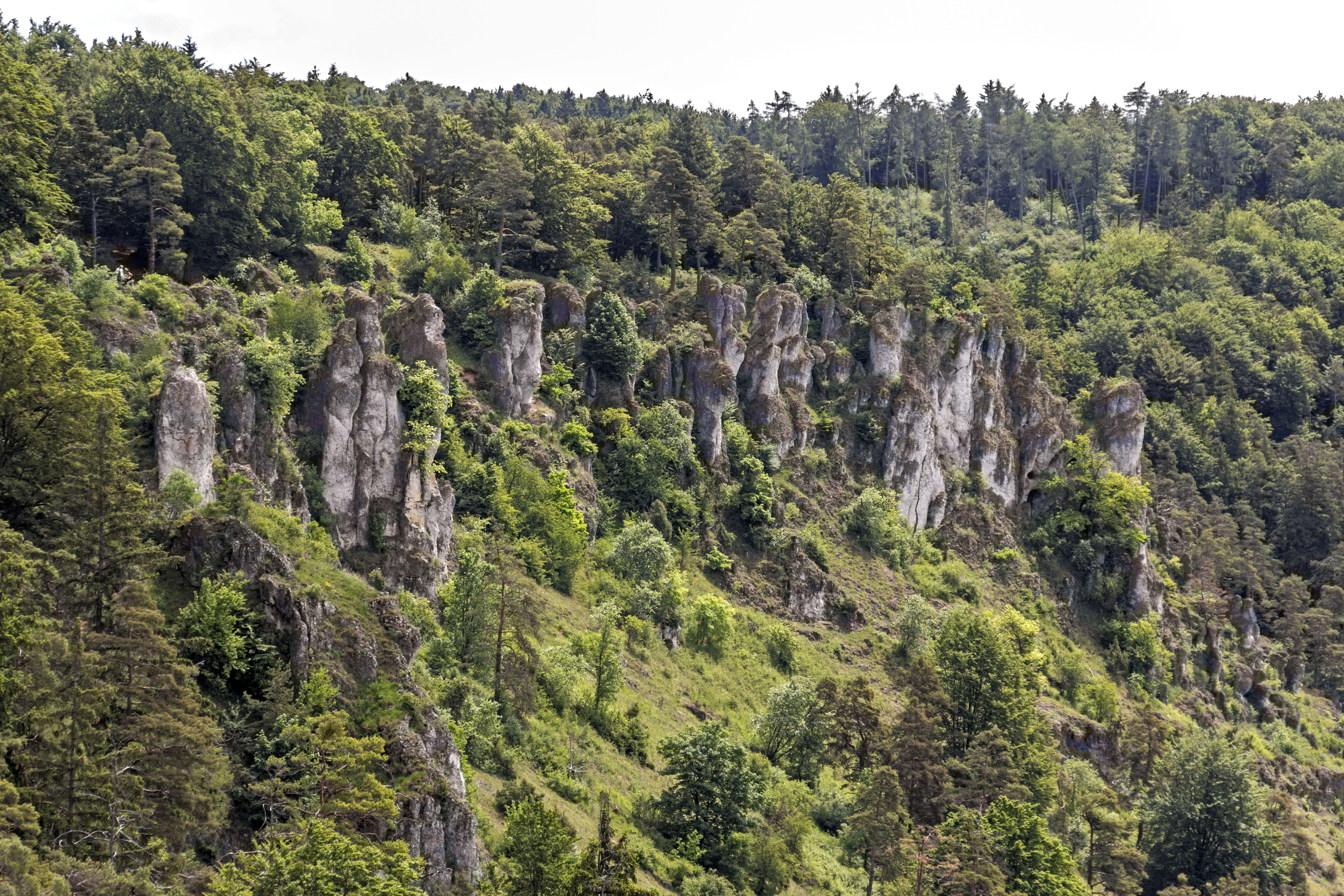 Naturschutzgebiet, Arnsberger Leite, Kipfenberg, Naturpark Altmühltal